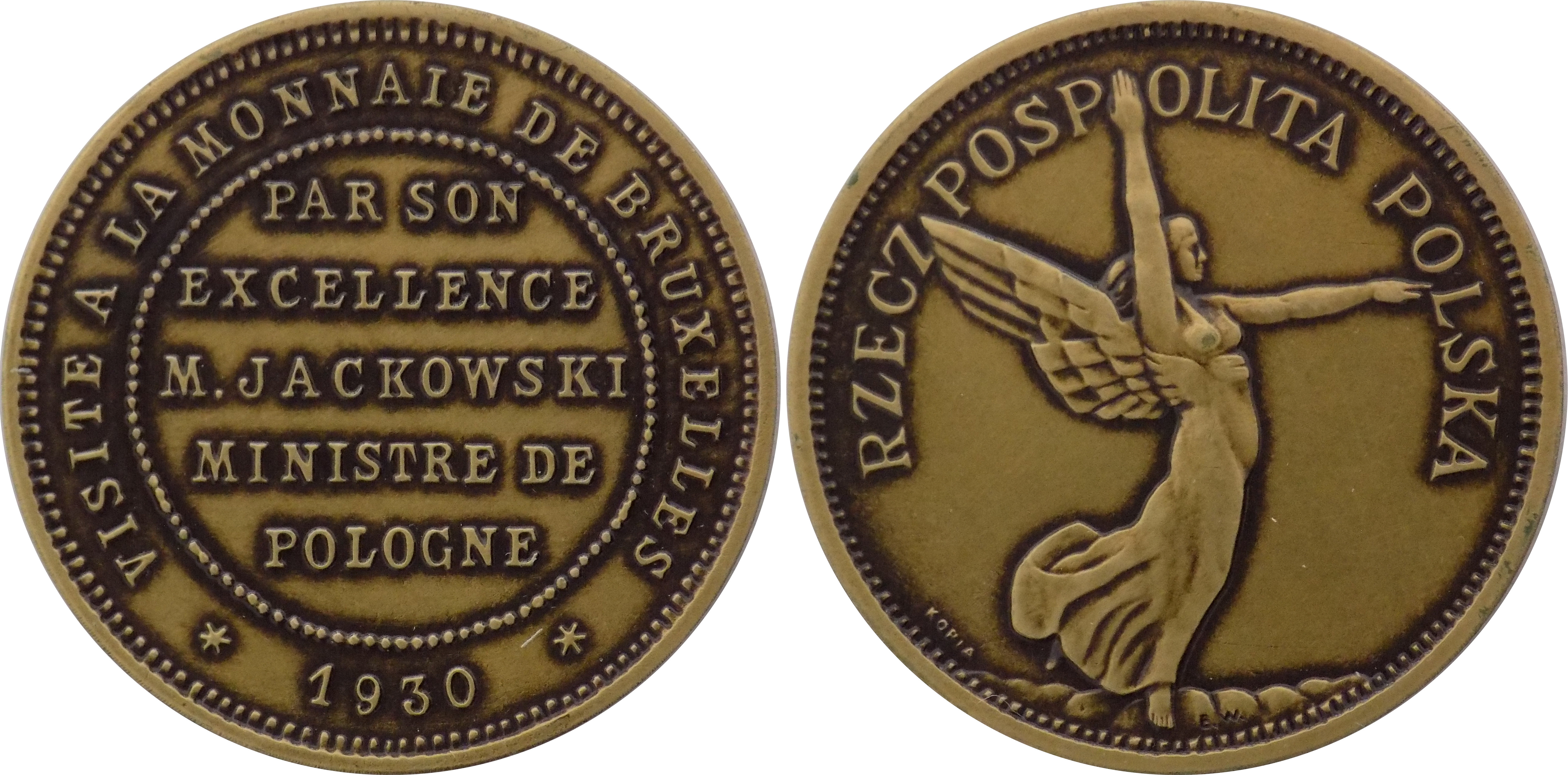 5 złotych 1930 Wizyta w Brukseli brąz